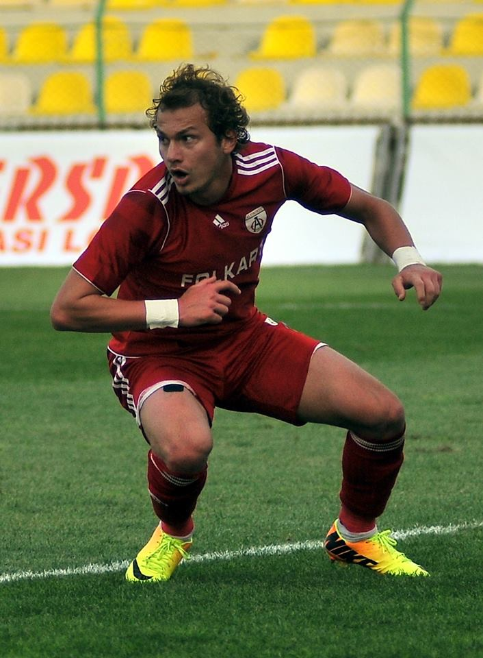 Mertan Caner Öztürk 2013 yılında Altınordu ile gol attığı maçta.